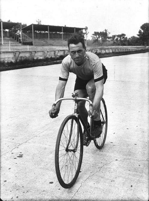 Portrait de Devoissoux à vélo